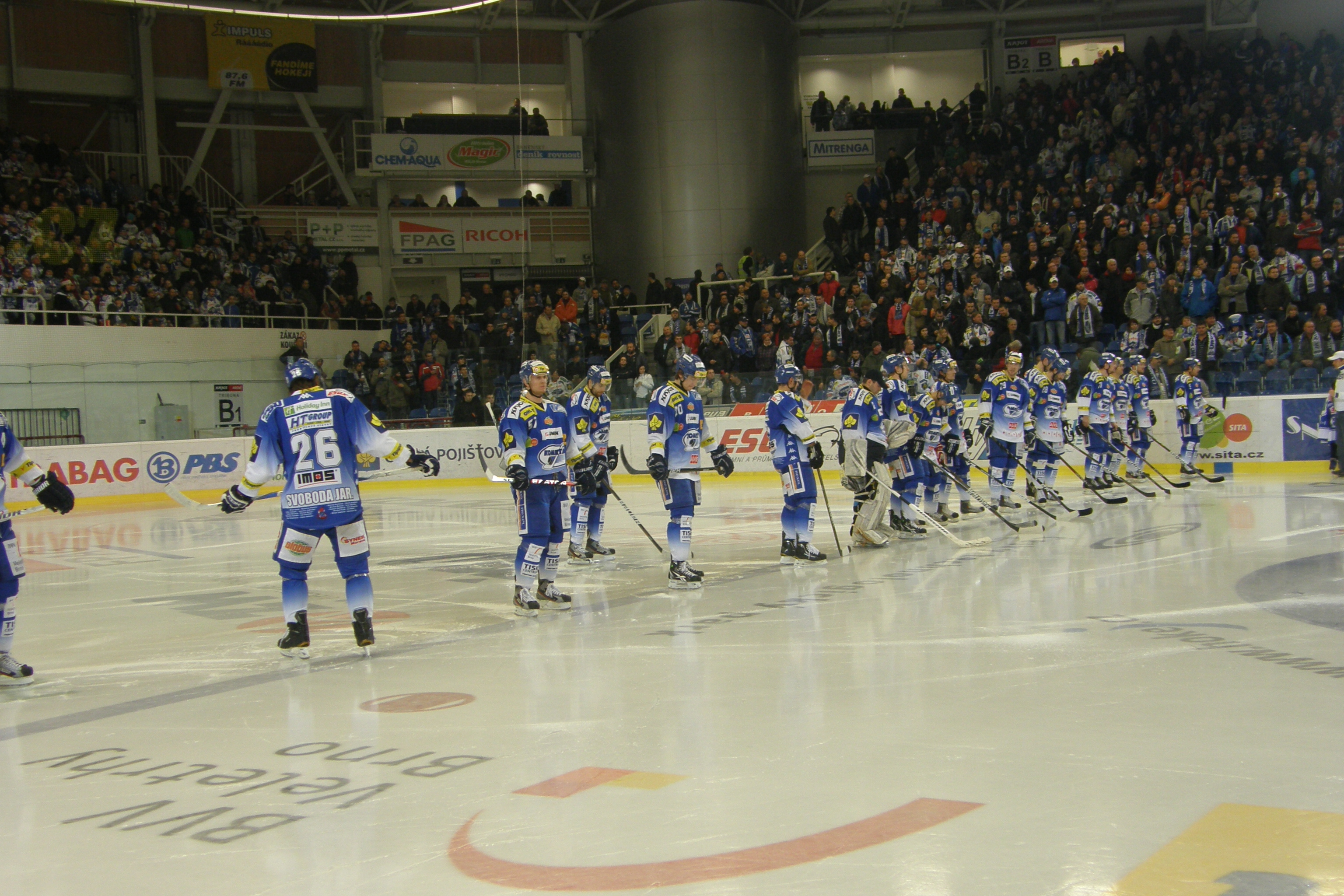 Tým HC Kometa Brno před zápasem s HC Plzeň 1929 v Kajot aréně